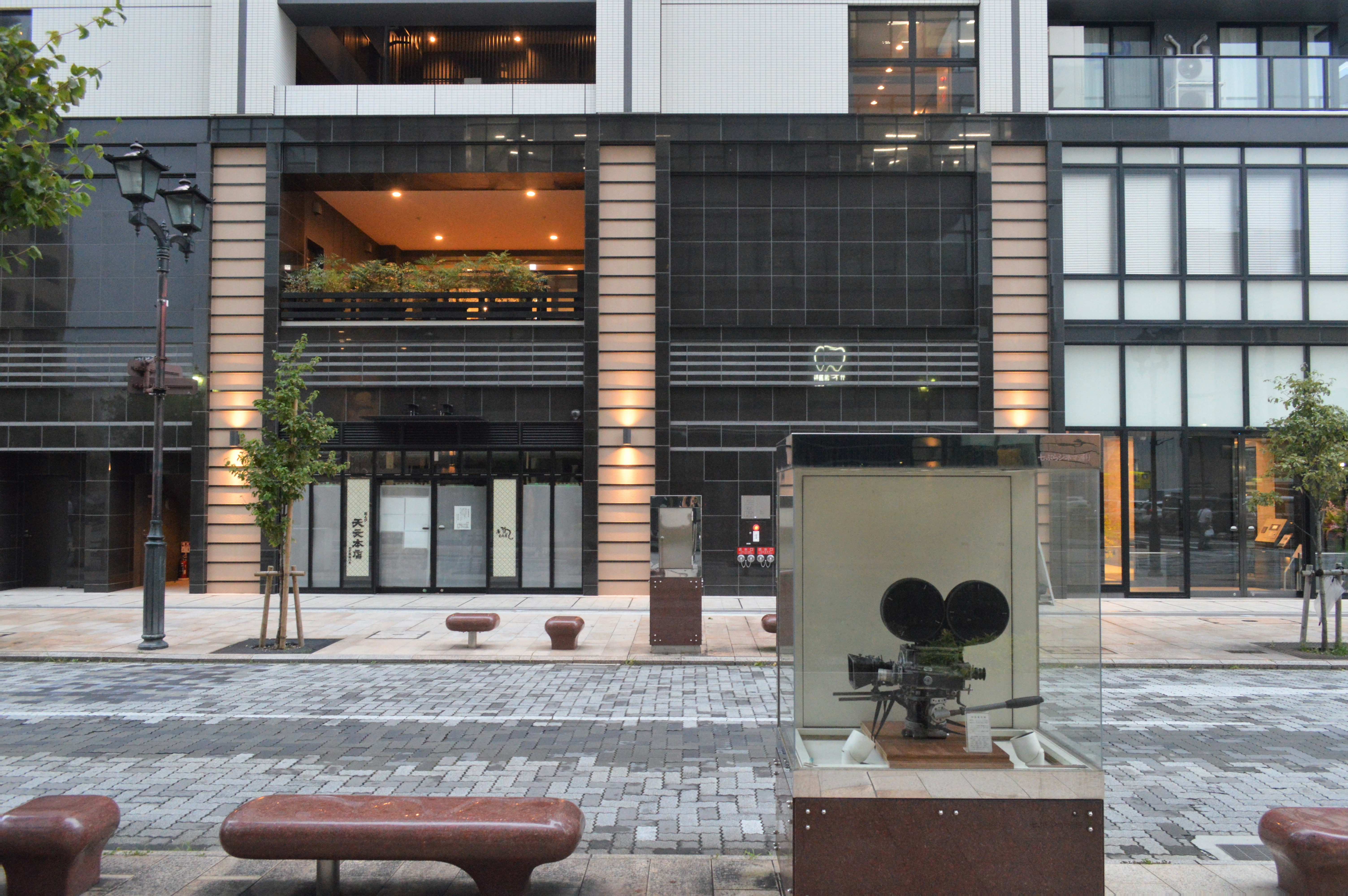 静岡市葵区七間町にある「七ぶらシネマ通り」。